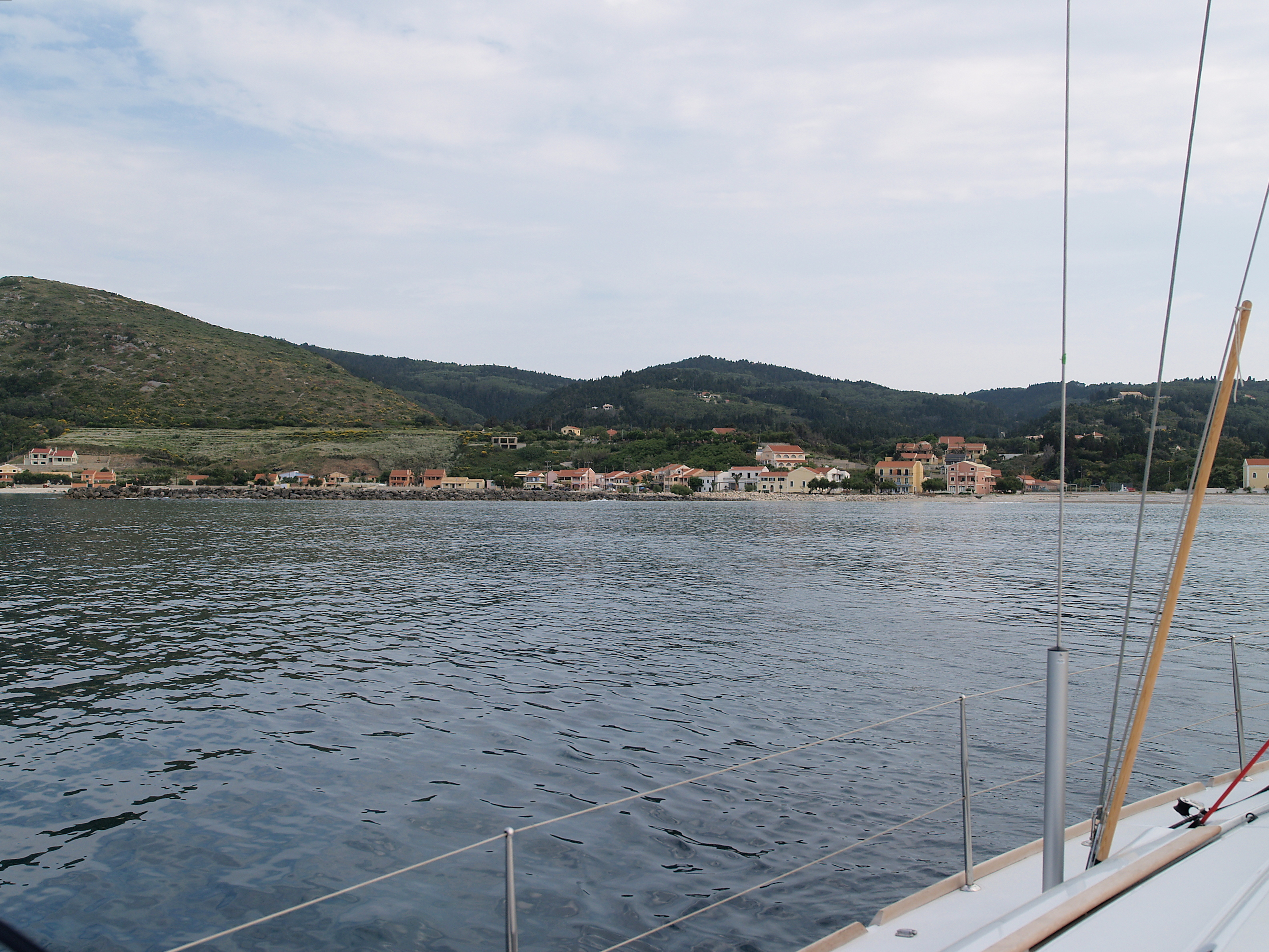 Hafenort Ammos auf Othonoi, links die Einfahrt zum Stadthafen